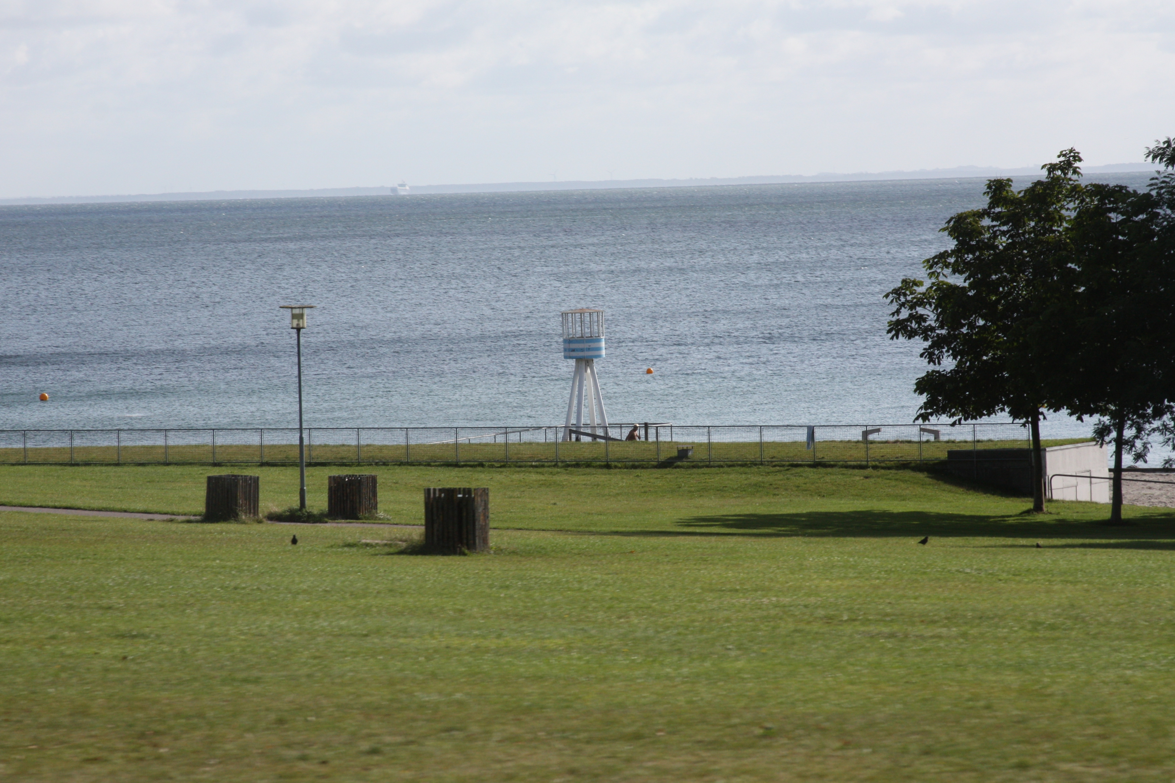 August 2009